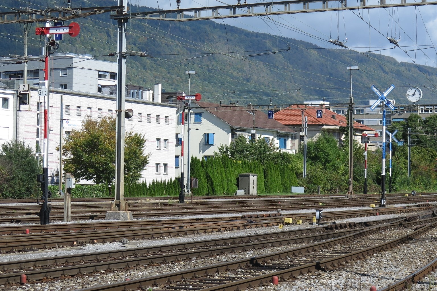 Signalgruppe Ausgangs des Rangierbahnhofes Biel mit mechanischen Signalen. Gleich mehrere Flügelsignale, auch als Semaphor bezeichnet, sowie Rangiersignale sichern die Ausfahrt Ostwärts Richtung Grenchen. Links zwei Halt zeigende Flügelsignale. Rechts zwei Rangieren verboten zeigende Rangiersignale (Sagbock, Sägebock, Räumsignal), ein weiteres Flügelsignal und eine Bahnhofsuhr hoch über den Geleisen. Es sind die mit Stand September 2015 letzten sich in der Schweiz in Betrieb befindenden mechanischen Signale im regulären Zugsverkehr. Alle andern sich noch im Betrieb befindenden mechanischen Signale befinden sich auf Museumsbahnstrecken.